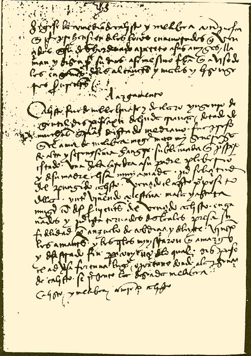 Primera página del fragmento celestinesco conservado en el Manuscrito de Palacio